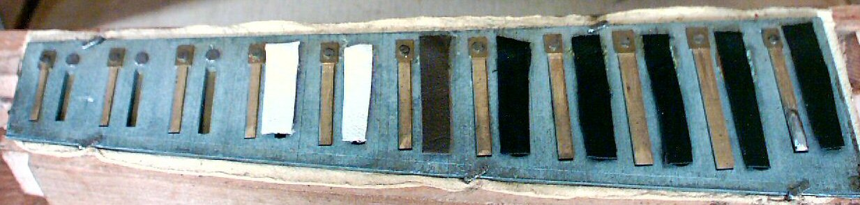 Lange Einzelstimmplatte eines alten diatonischen Akkordeons aus den 20er Jahren Möglichkeiten zur Lizenzierung, bitte die nicht-benötigte Variante aus dem Code löschen